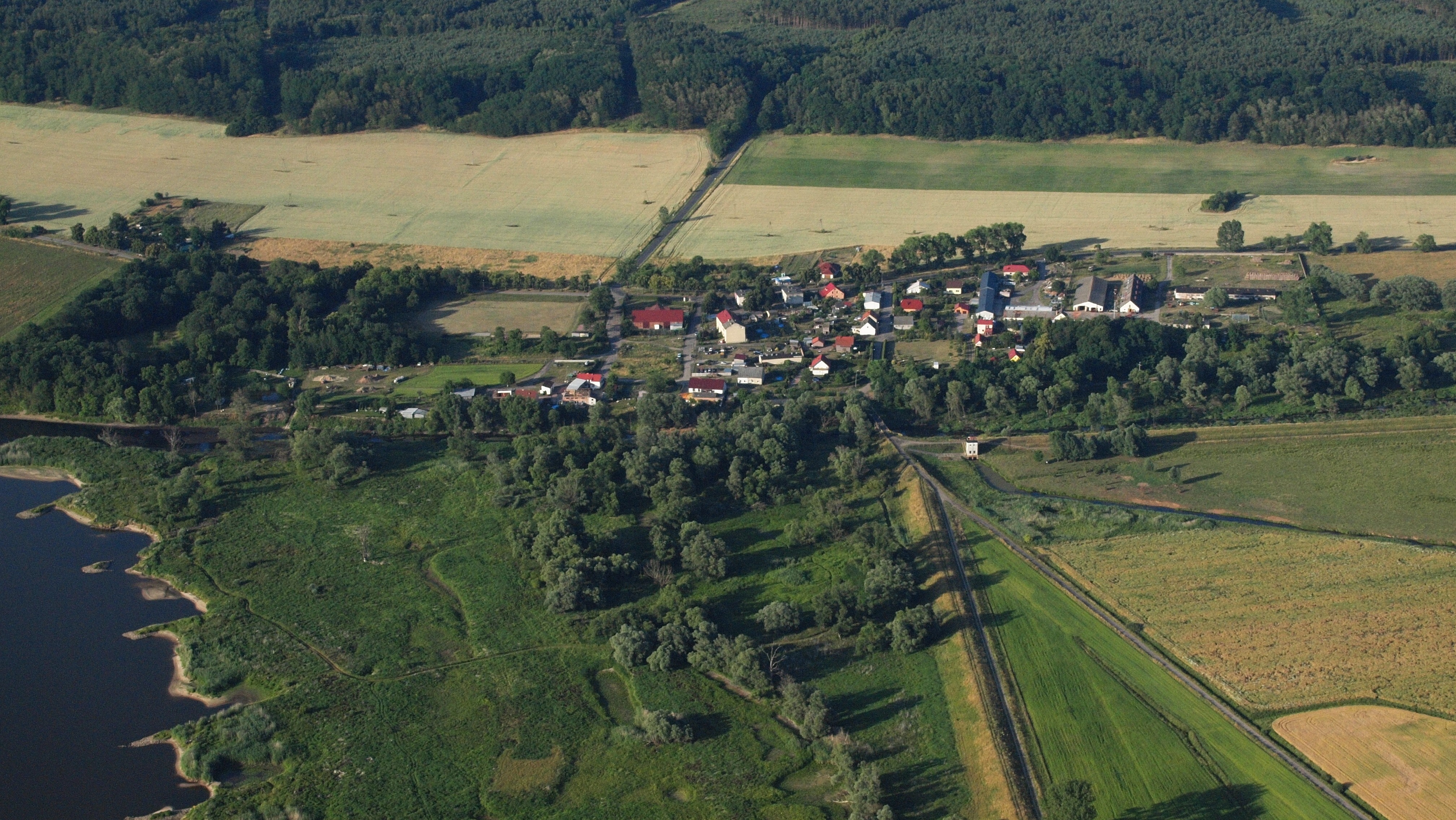 Świecko, Polen, Luftaufnahme (2015)